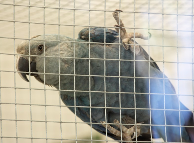 Spixara (Cyanopsitta spixii)